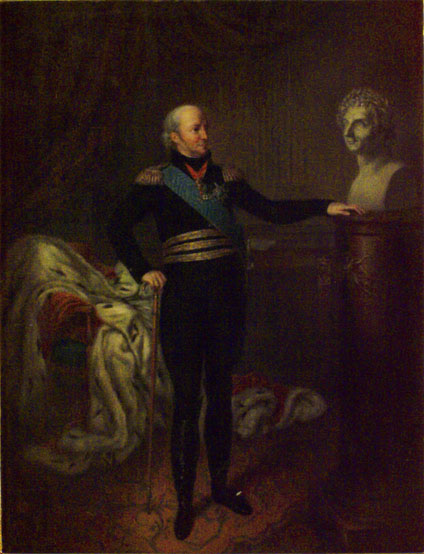 Karl XIII